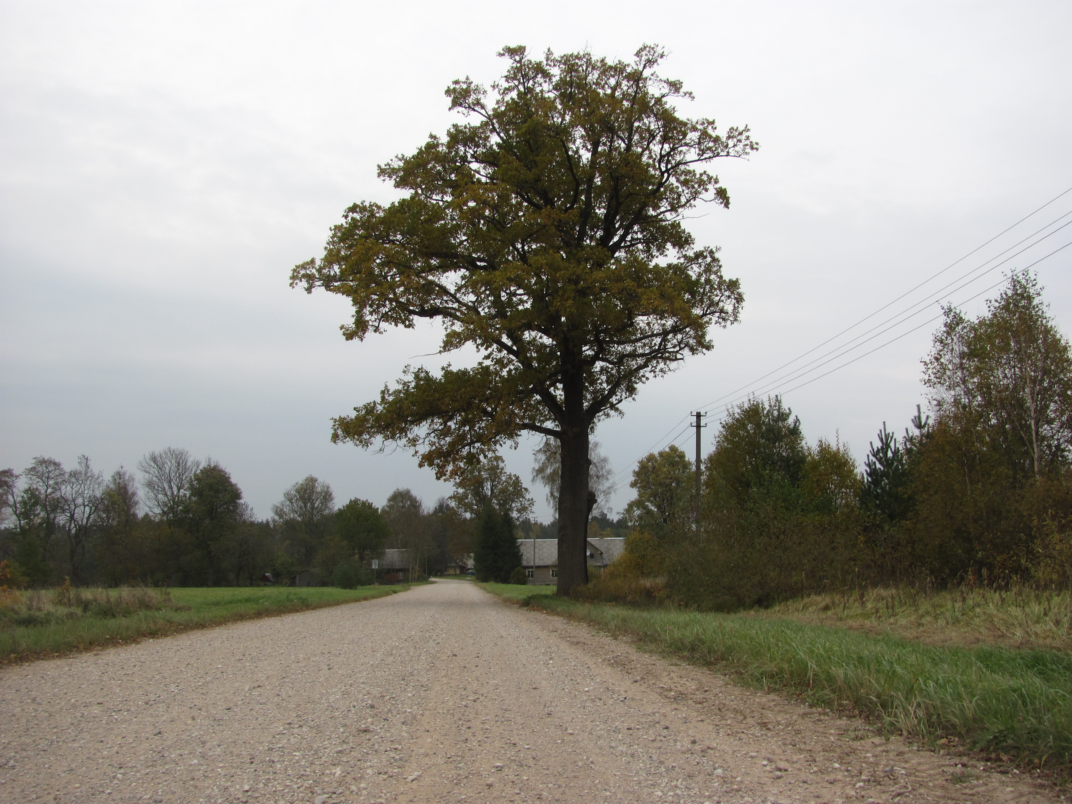 Užpalių sen., Lithuania